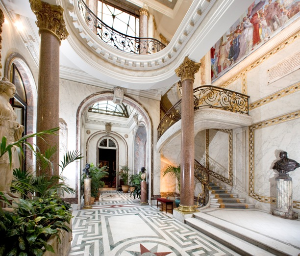 Le jardin d'hiver